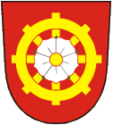 znak obce